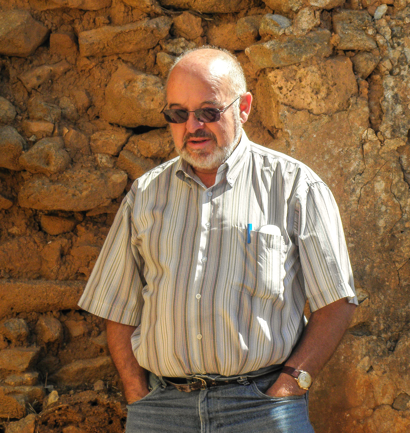 El historiador medievalista y arqueólogo Ramón Bohigas Roldán (Santander 1956) en una visita a Castro Rubio, en 2011.